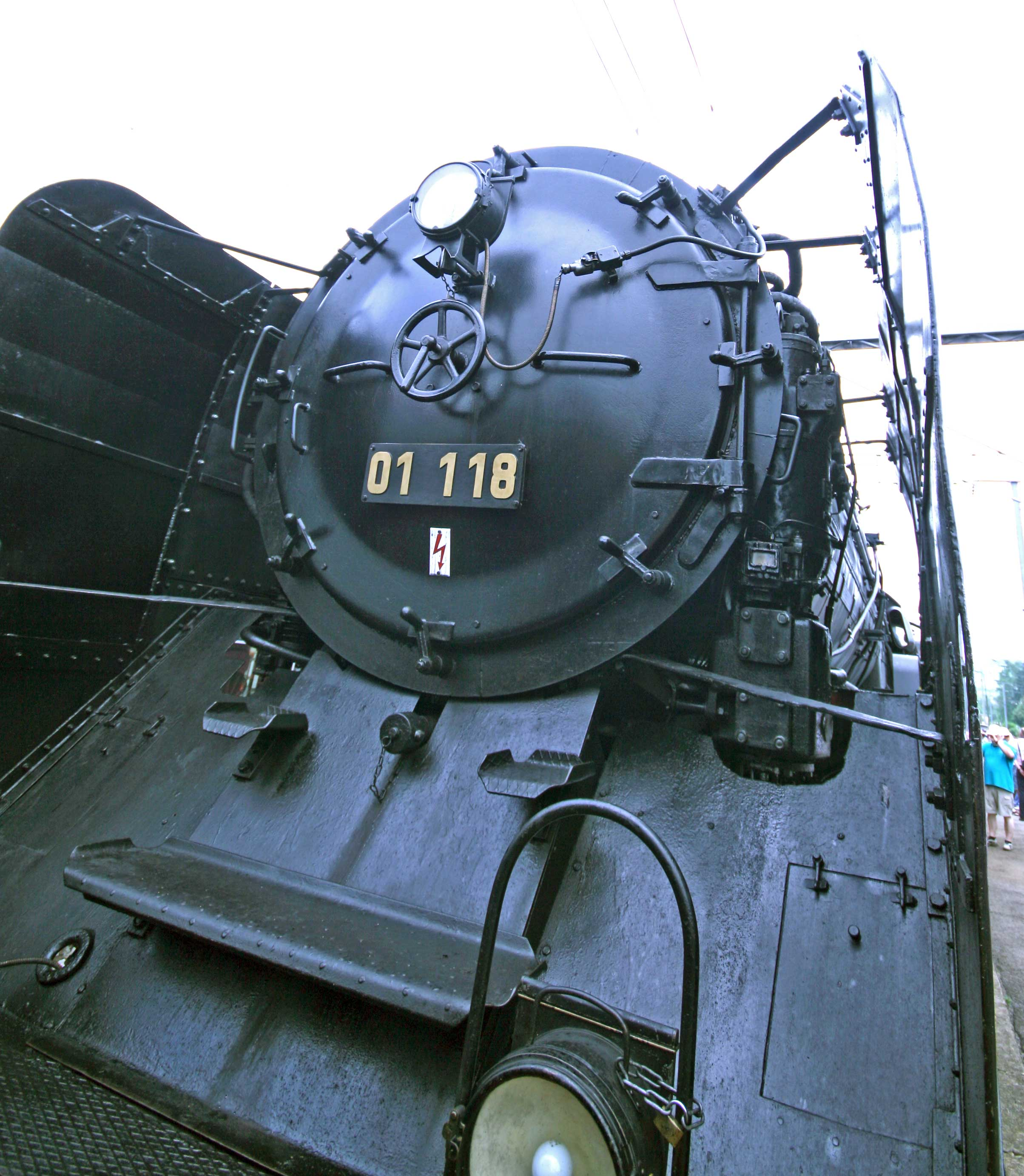 Sujet:Wandblech.